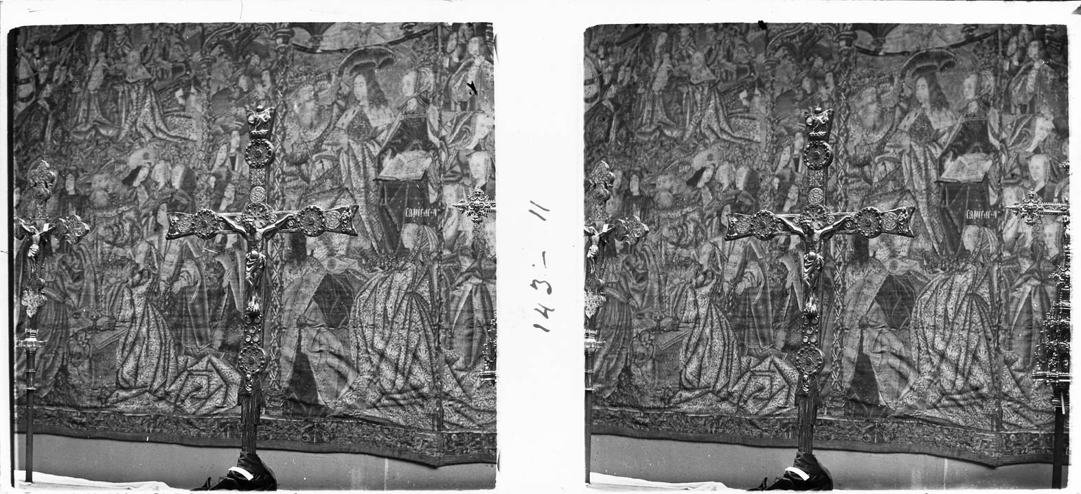 Anvers de la creu de Vilabertrán. Josep Salvany i Blanch (1913)